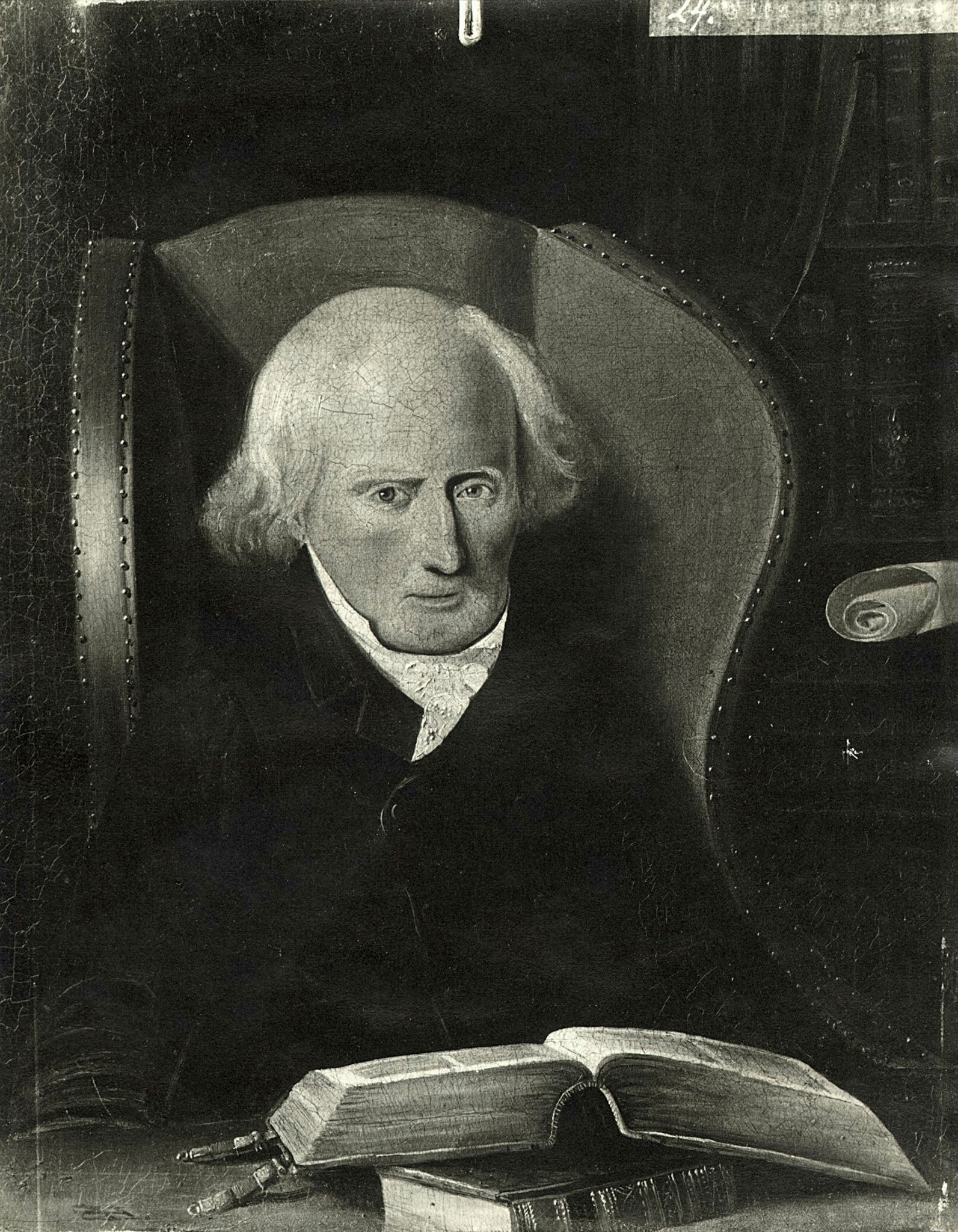 Tegning av David Arnesen etter oljemaleri av Adolf Tidemann, portrett av Anton Beatus Adeler